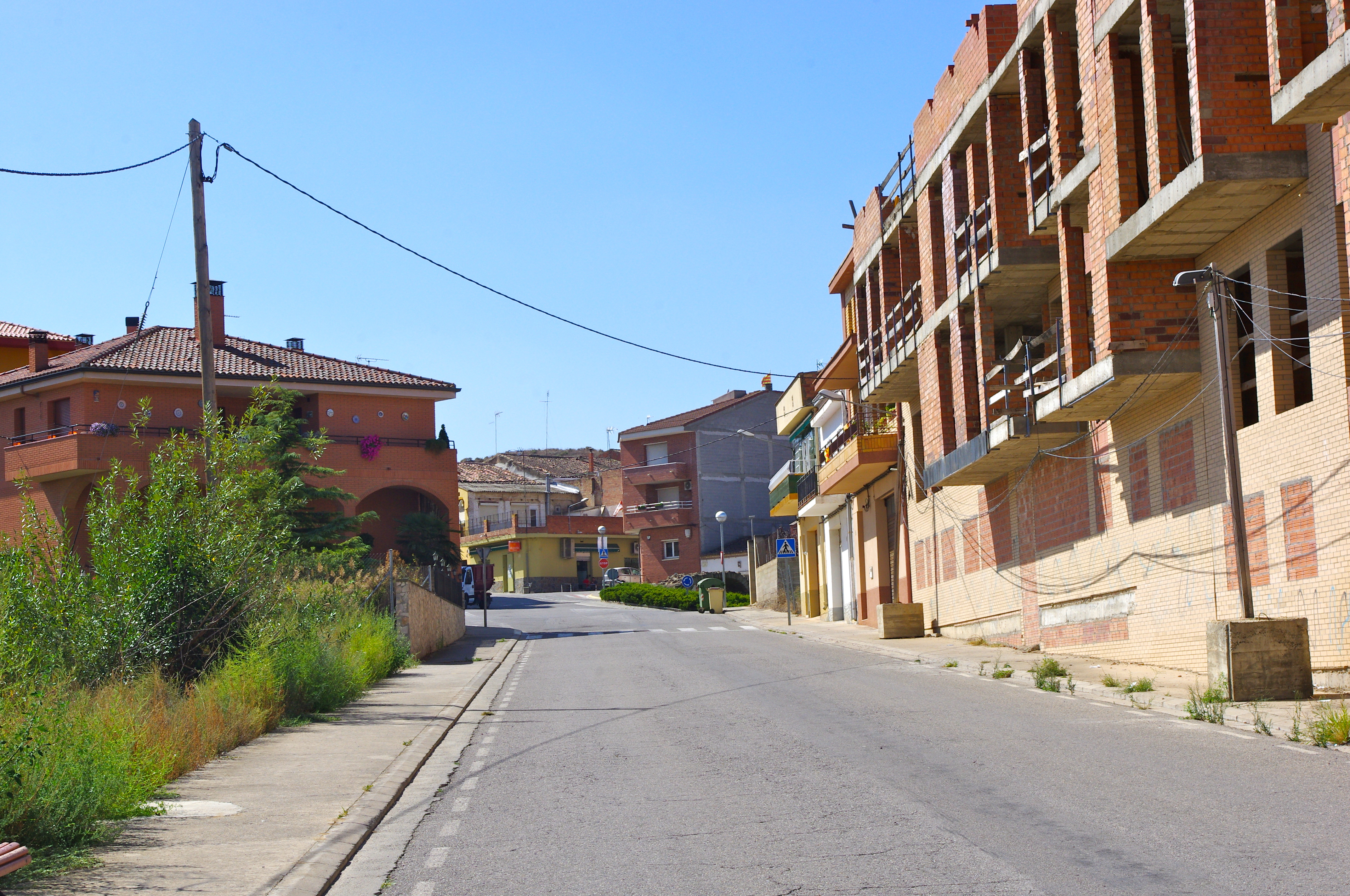 Entrada a Alcoletge des del camí de Bellvís amb diferents edificis en construcció en primer terme.